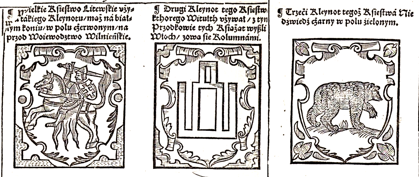 В труде польского историка Бартоша Папроцкого "Гнездо добродетели..." (1578) приводится целых три герба Великого княжества Литовского. 1) Погонь в красном поле — герб княжества и Виленского воеводства; 2) Колюмны; 3) чёрный медведь в зелёном поле. Bartłomiej Paprocki "Gniazdo cnoty z kąd Herby Rycerstwa slawnego Krolestwa Polskiego, Wielkiego Księstwa Litewskiego, Ruskiego, Pruskiego, Mazoweckiego, Zmudzkiego, y inszych Panstw do tego Krolestwa nalezących Ksiązat, y Pánow, początek swoy máją"